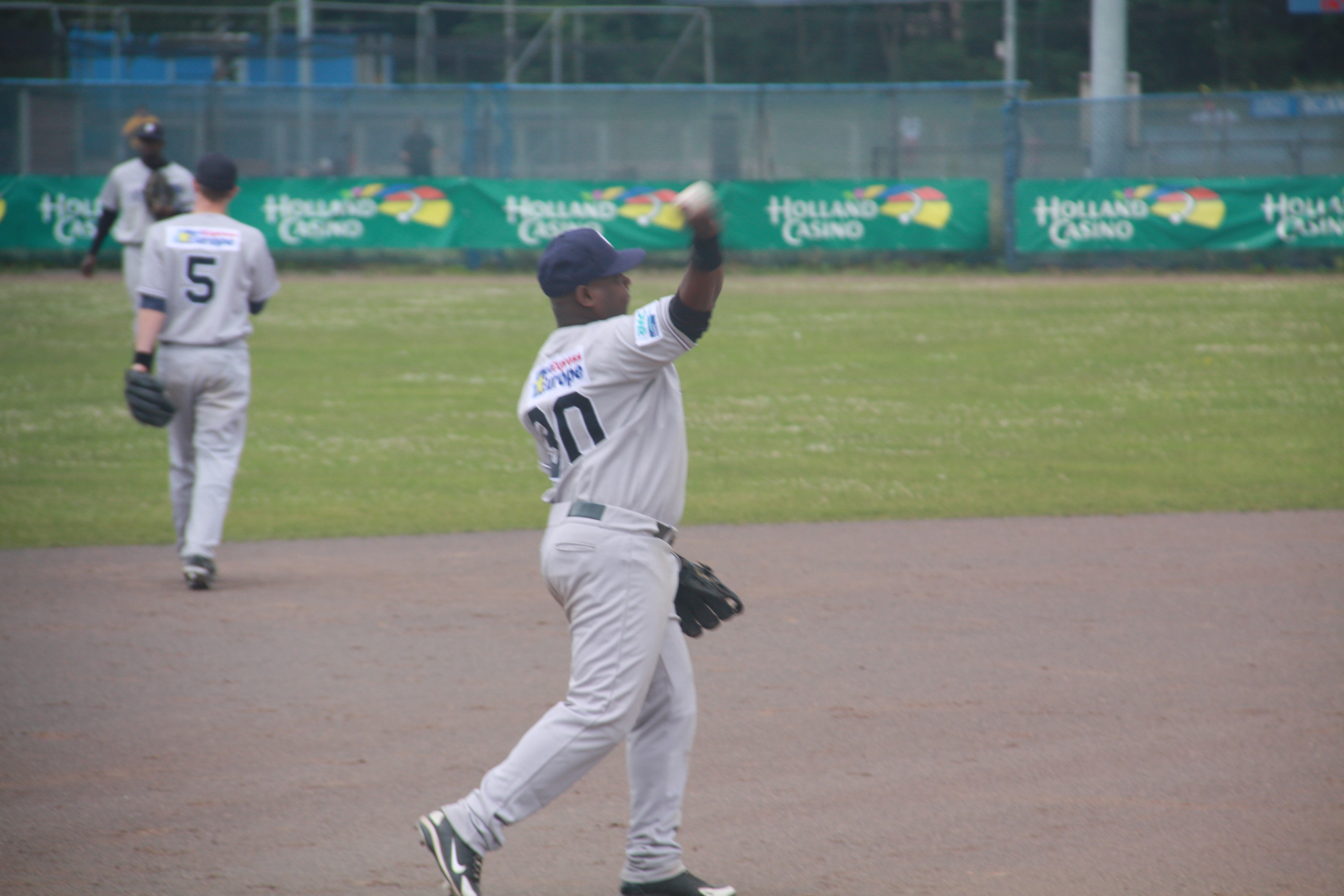 Honkbalwedstrijd tussen HCAW en Neptunus (honkbal) op 7 juni 2009